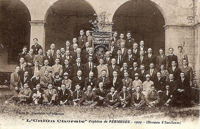 L'Union Chorale, Orphéon dee Périgueux en 1929.